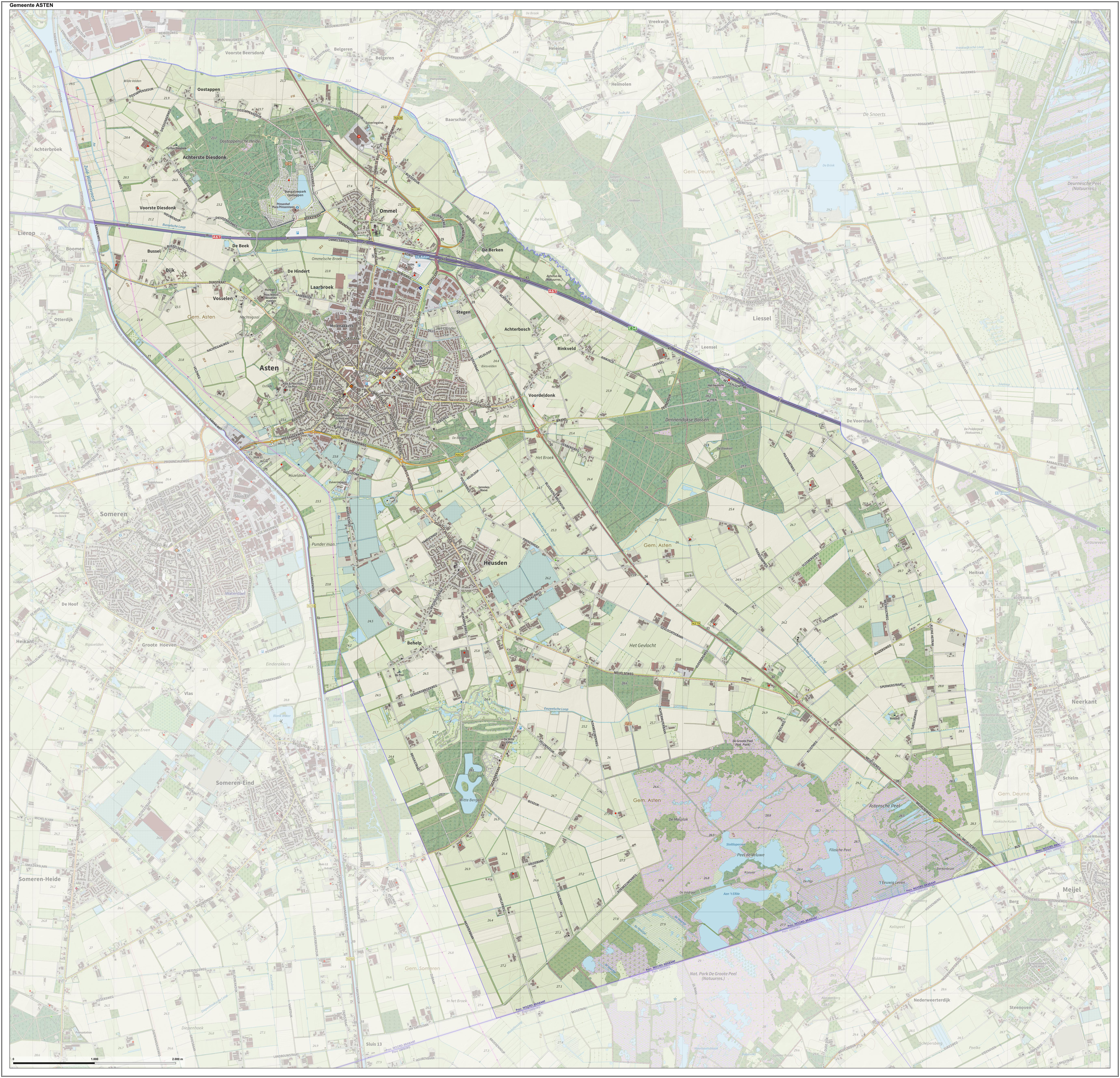 Topografische gemeentekaart. Resolutie: 400 pixels/km. Kaartbeeld samengesteld uit de open geodata van de Top10NL en Top25namen (Basisregistratie Topografie, Kadaster), Creative Commons BY licentie. Gebouwvlakken uit open geodata BAG extract. Wegen uit de OpenStreetMap, OpenStreetMap community. Schaduwreliëf uit de Actuele Hoogtekaart AHN2. Samenstelling en kleurenschema: Jan-Willem van Aalst, met QGIS2. Zie ook de Legenda.